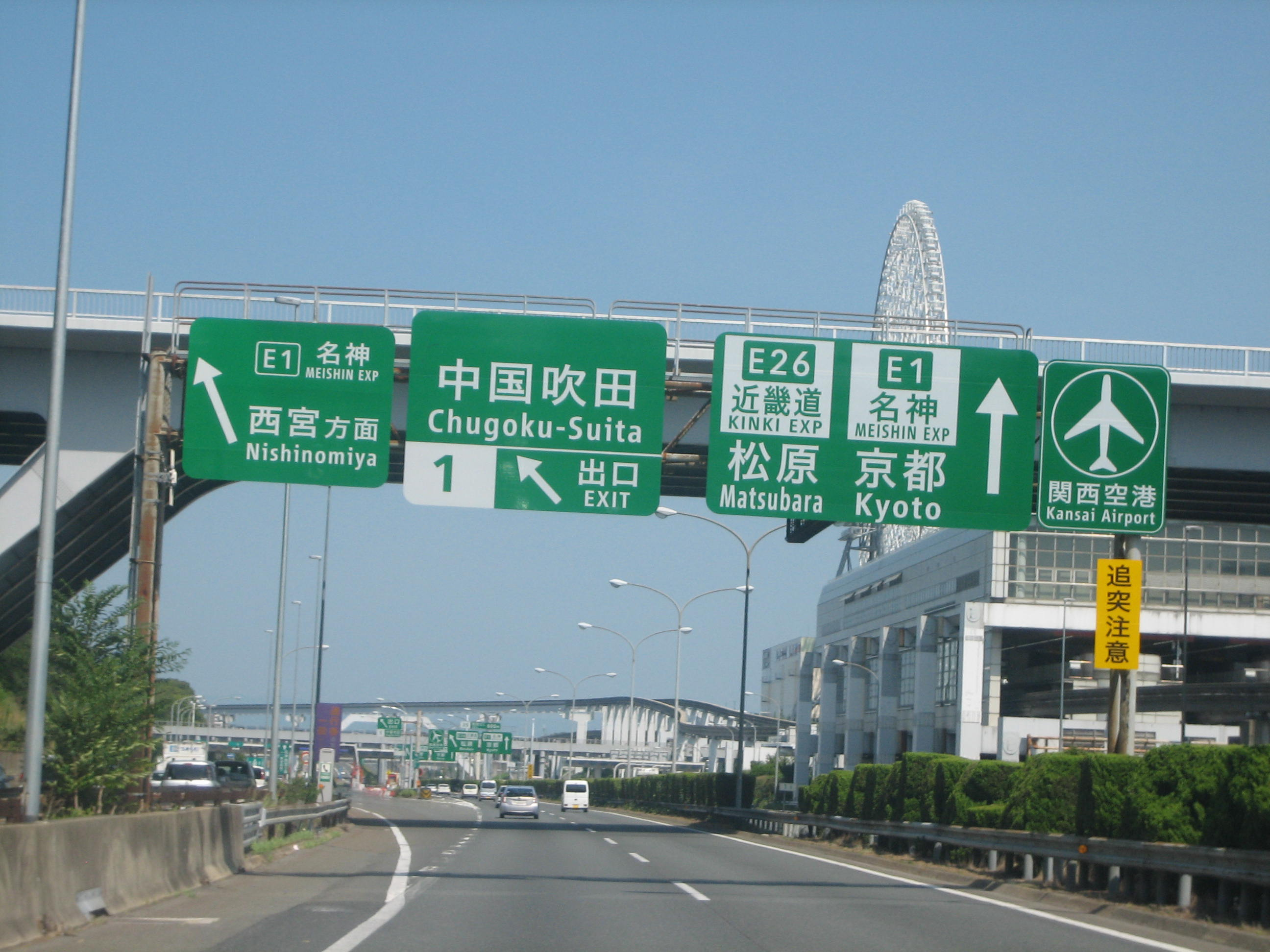 中国吹田IC